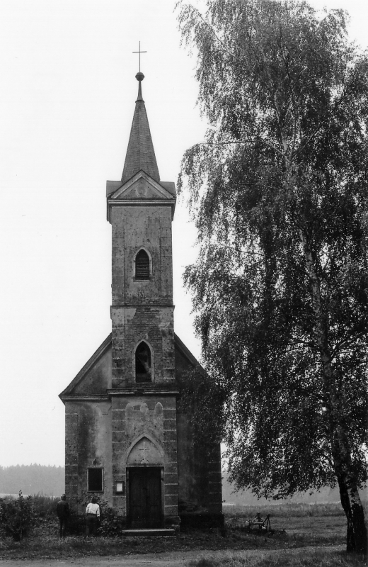 Milles (Mlýnec pod Přimdou): Kirche am Haider Weg von 1935 (mit Kriegergedenktafel).